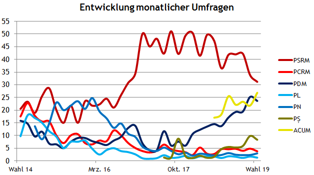 Mittelwerte von Umfragen für die moldawische Parlamentswahl 2019